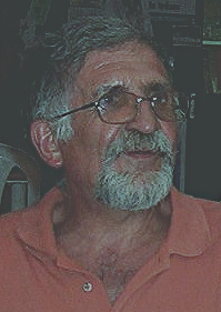 Yves Lignon, 2005.